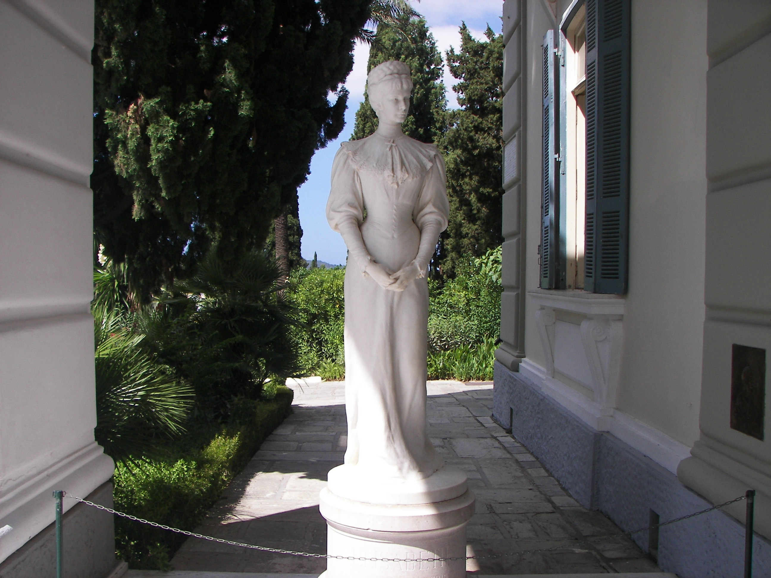 Statua dell'imperatirce Elisabetta d'Austria (detta "Sissi) nel palazzo dell'Achilleion a Corfù (Grecia).